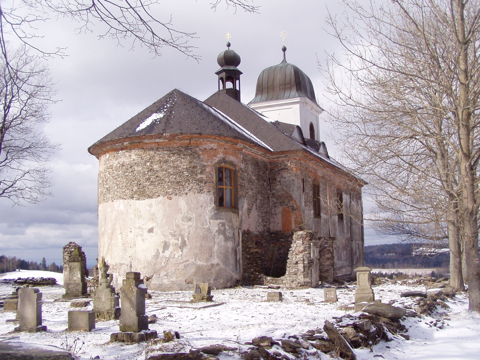 Kostel sv. Matouše Jedlová - zezadu